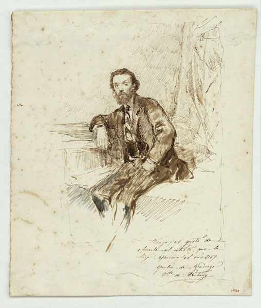 Retrat de Tomàs Moragas per Marià Fortuny